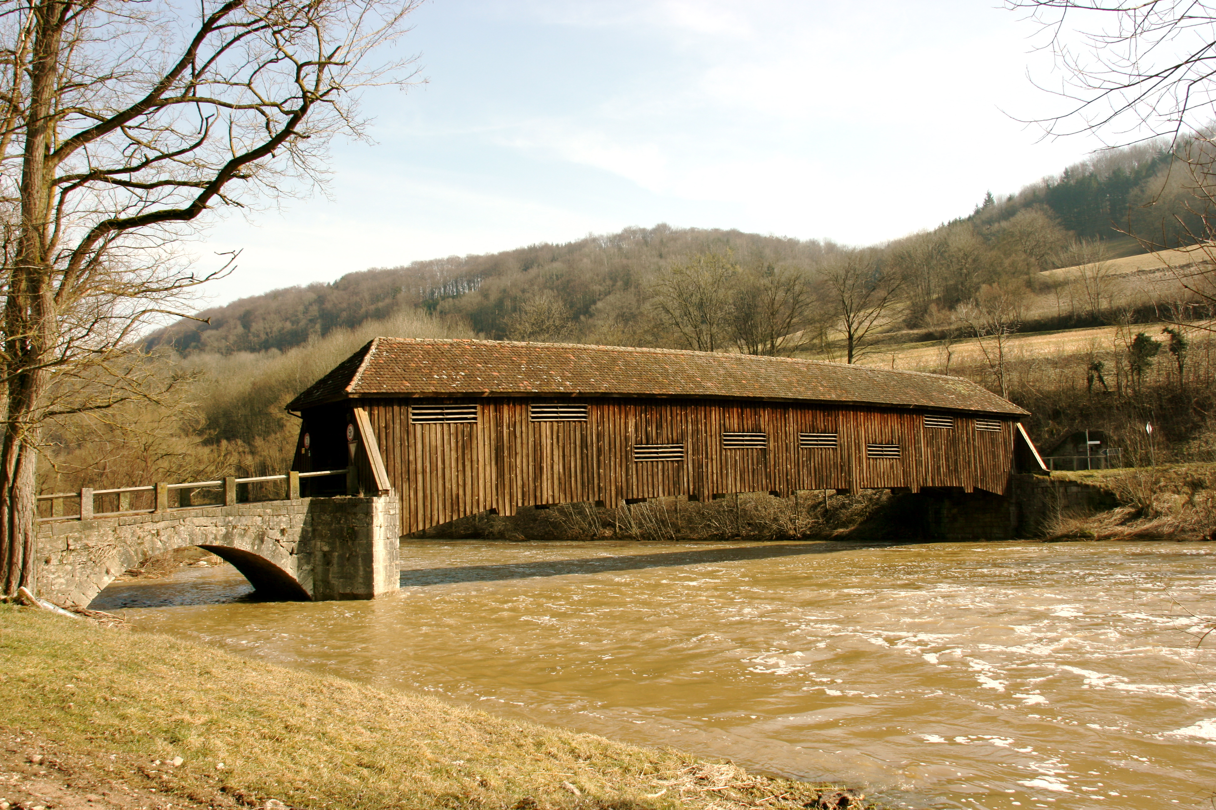 Archenbrücke Unterregenbach